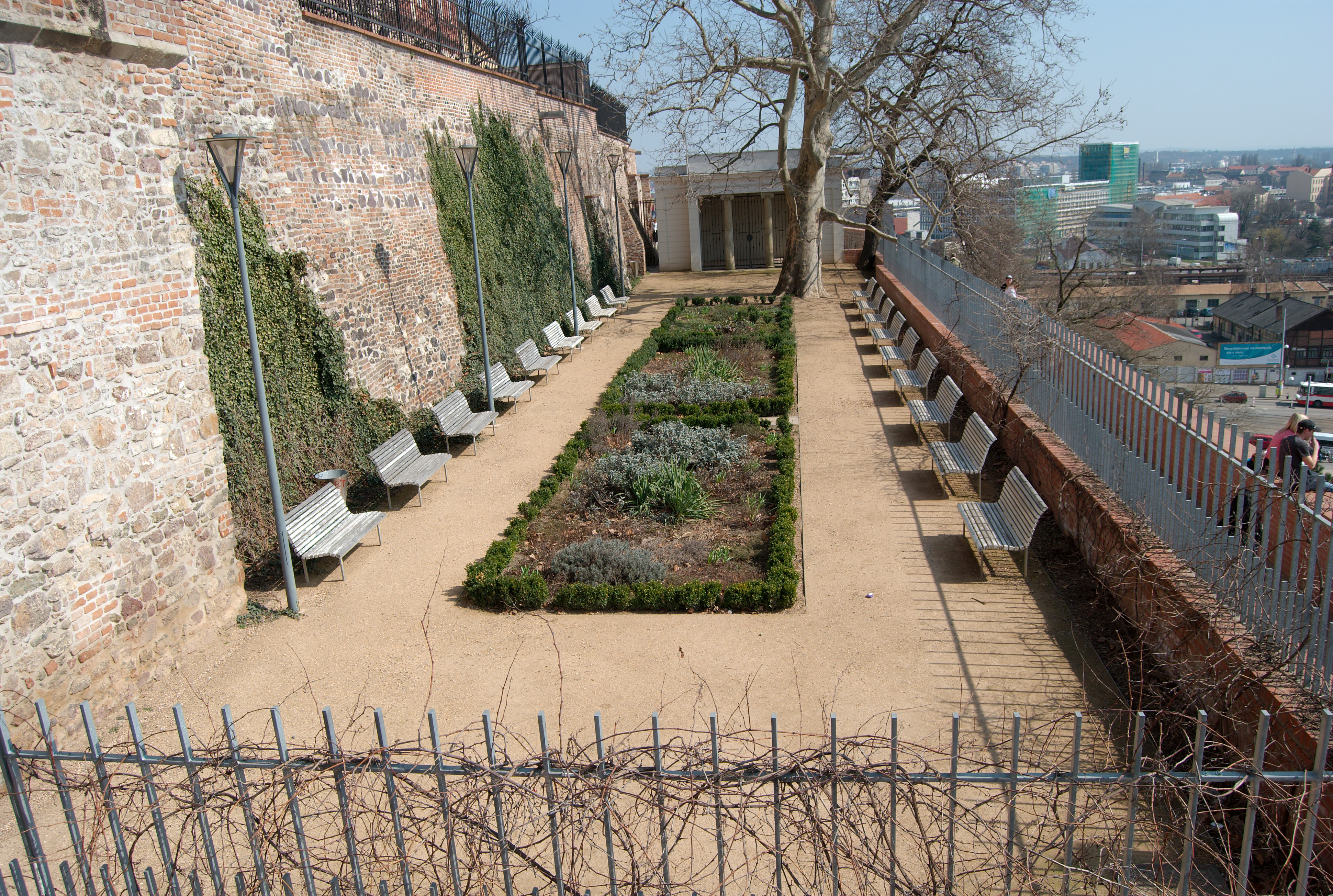 Město Brno - Místodržitelská zahrada v Denisových sadech